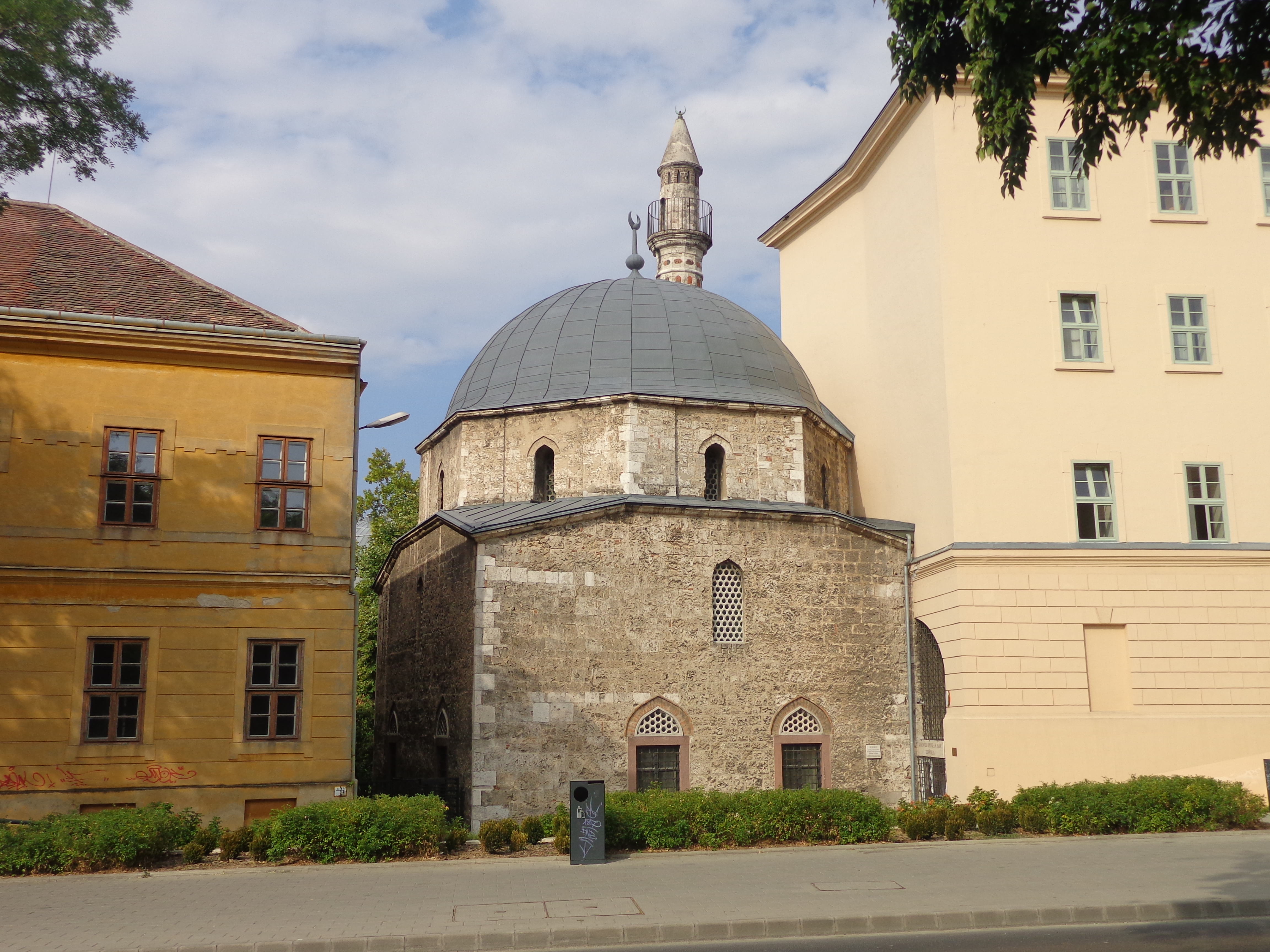 Jakováli Hasszán pasa dzsámija This is a photo of a monument in Hungary. Identifier: 1773